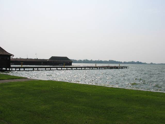 Palić